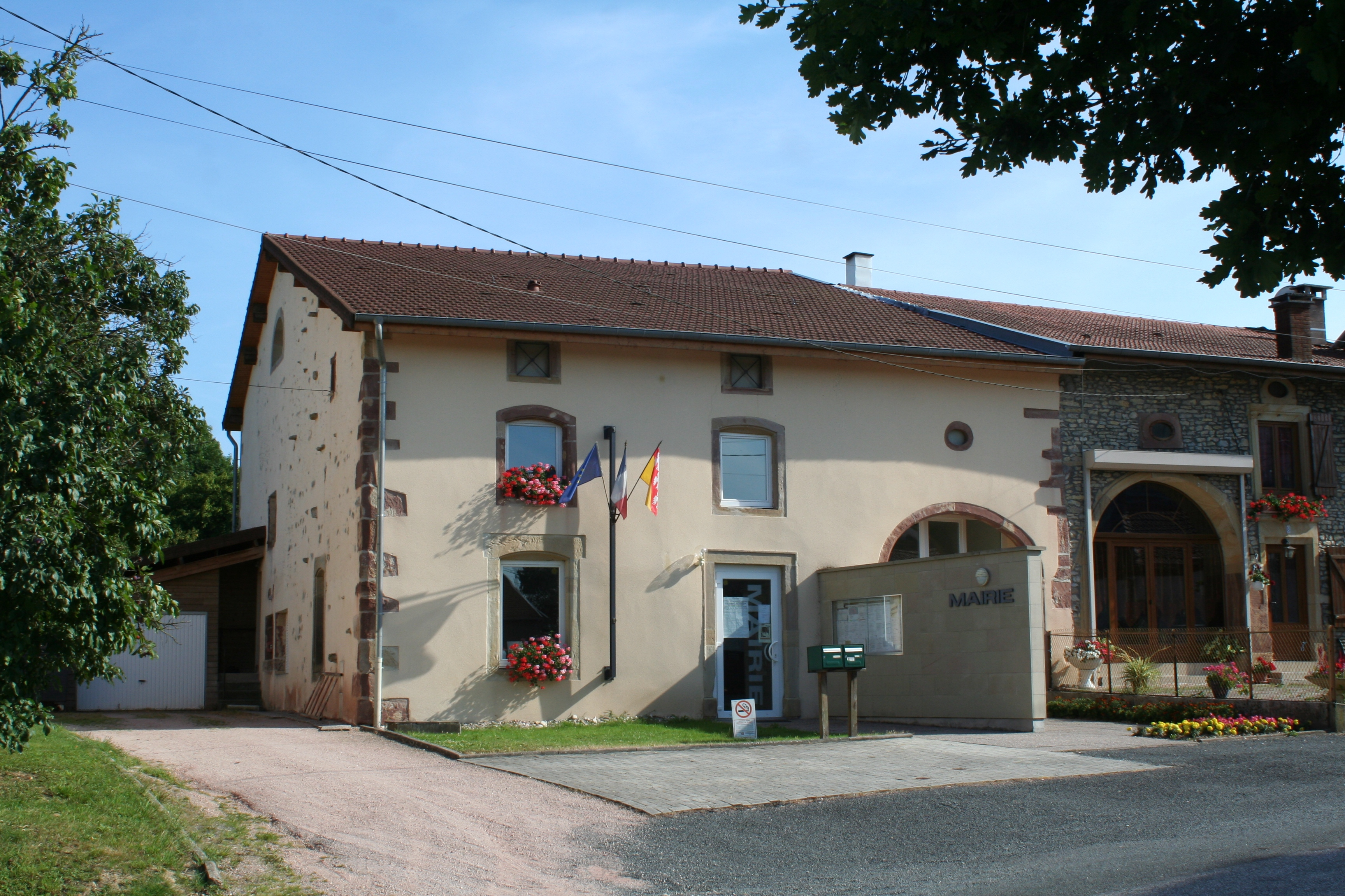 Mairie de Vomécourt (Vosges)